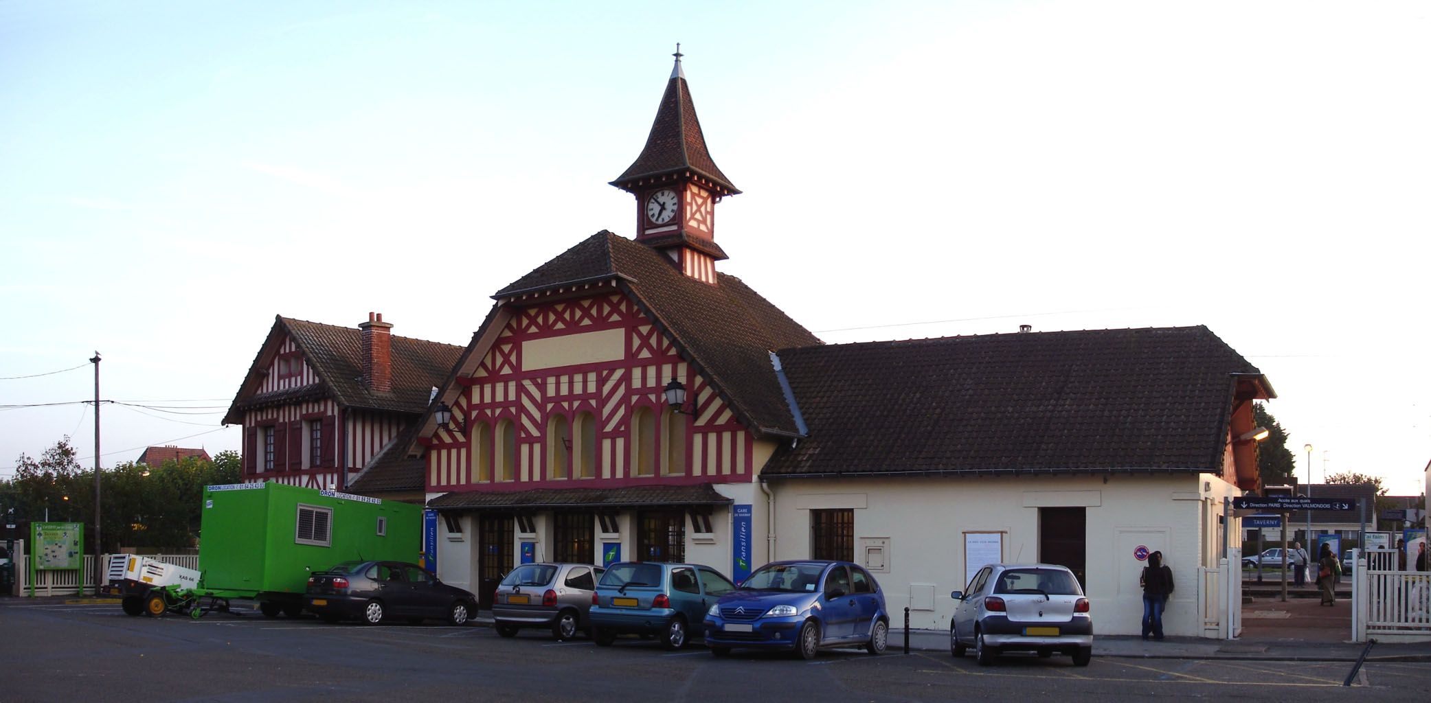 Gare de Taverny (Val-d'Oise), France.